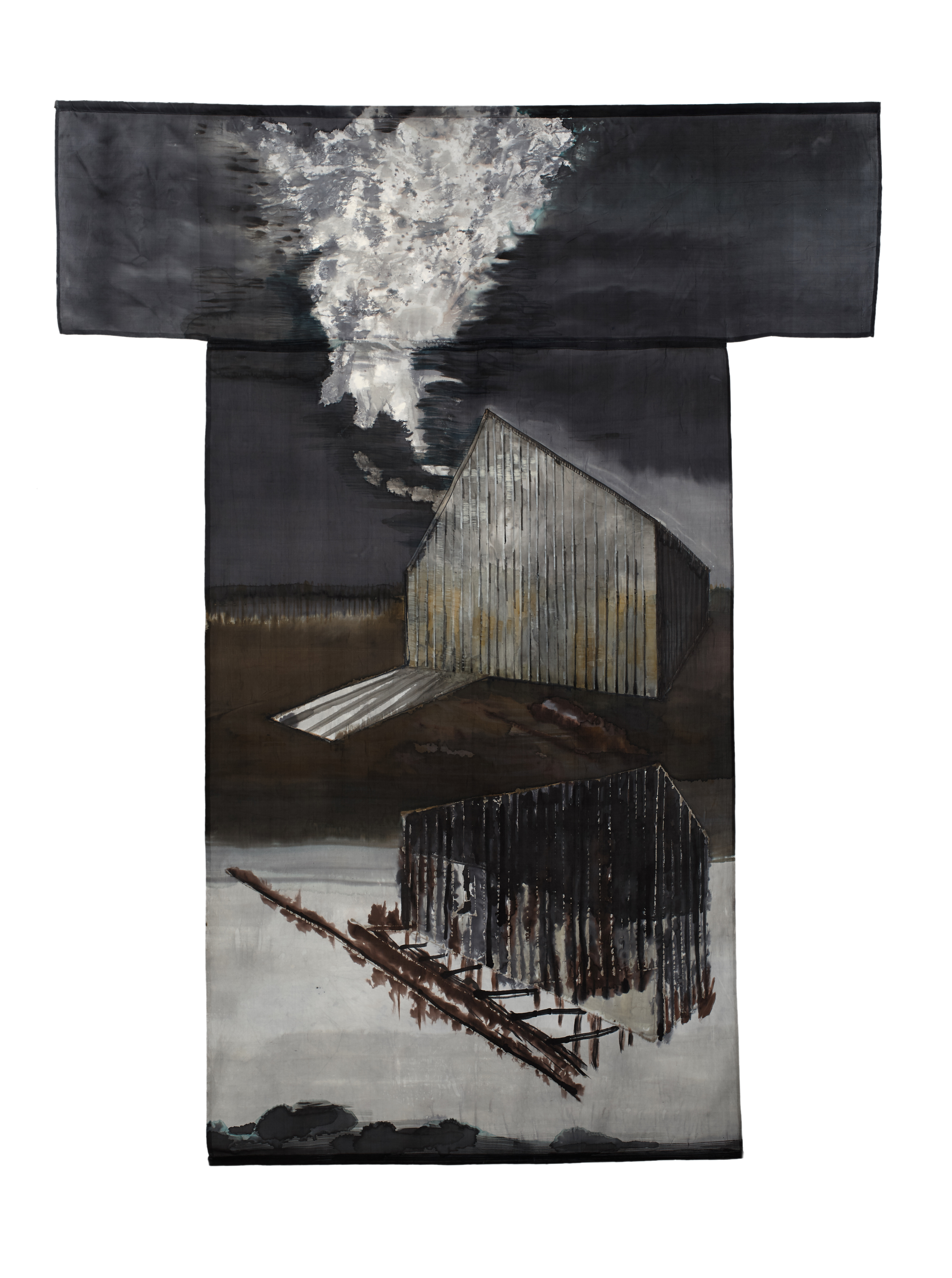 Joanna Stasiak, Na pogorzelisku, 2019, jedwab